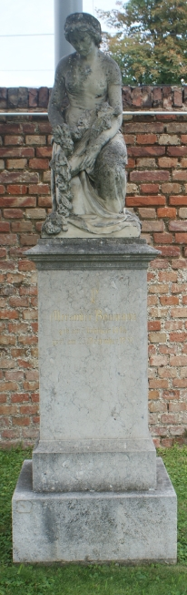 Alexander Baumann-Wiener Zentralfriedhof (0-1-56)